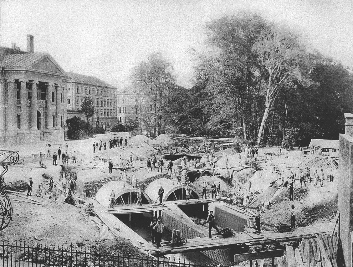 Überwölbung des Schwabinger Bachs vor dem Prinz-Carl-Palais